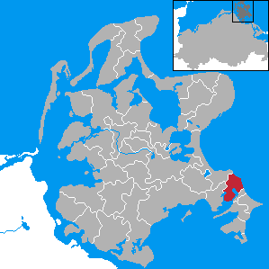 Sellin, Landkreis Rügen, Mecklenburg-Vorpommern